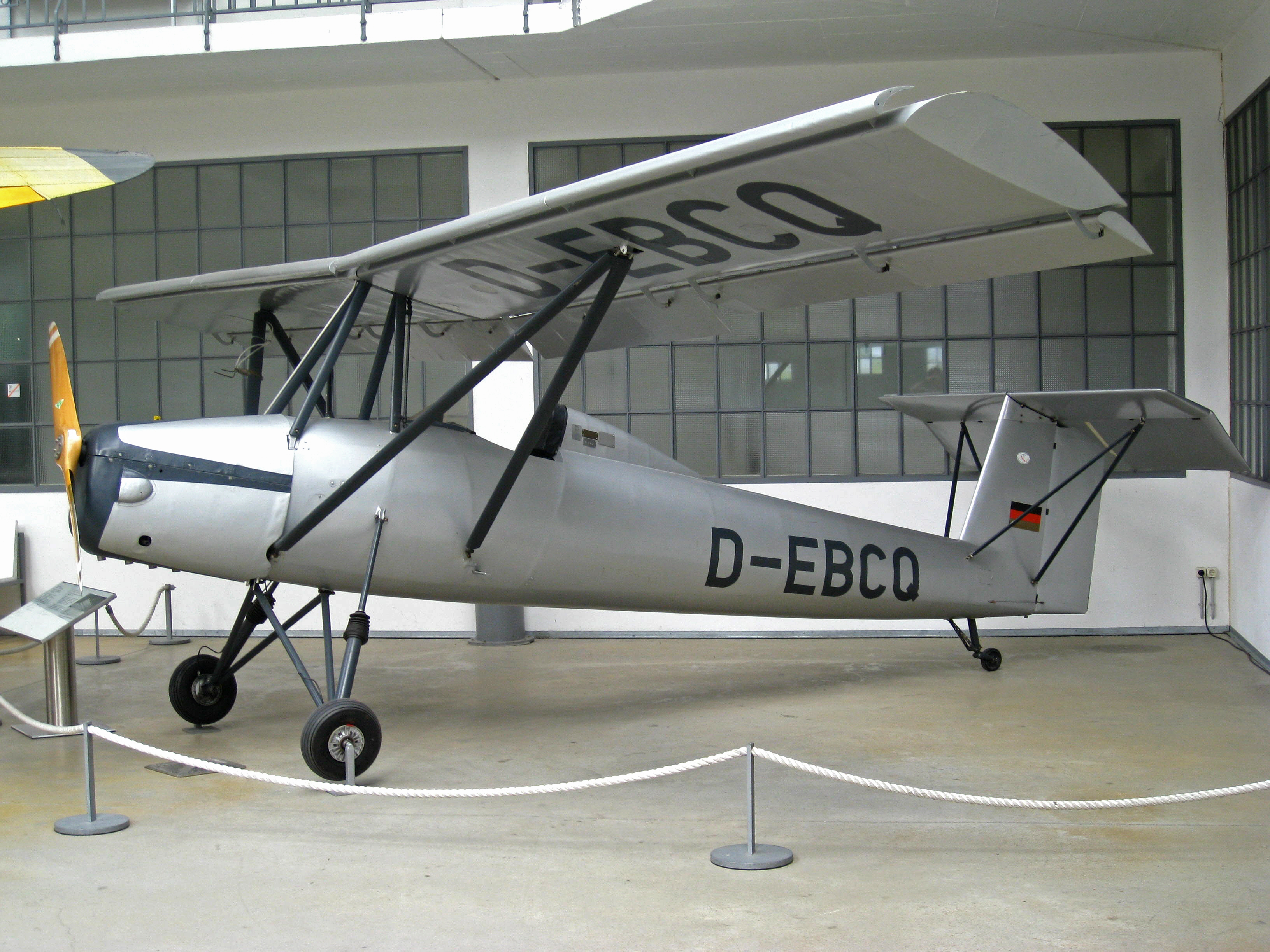 Brunswick LF.1 Zaunkoenig at Deutsches Museum, Oberschleissheim.